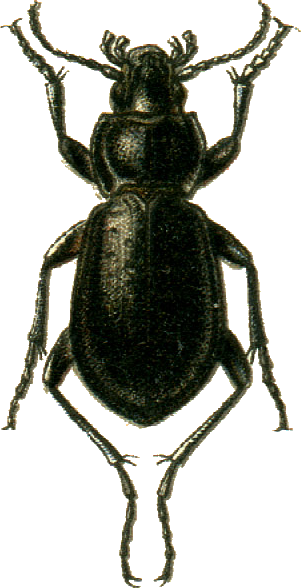 This file has been extracted from another file: Jacobs07.jpg